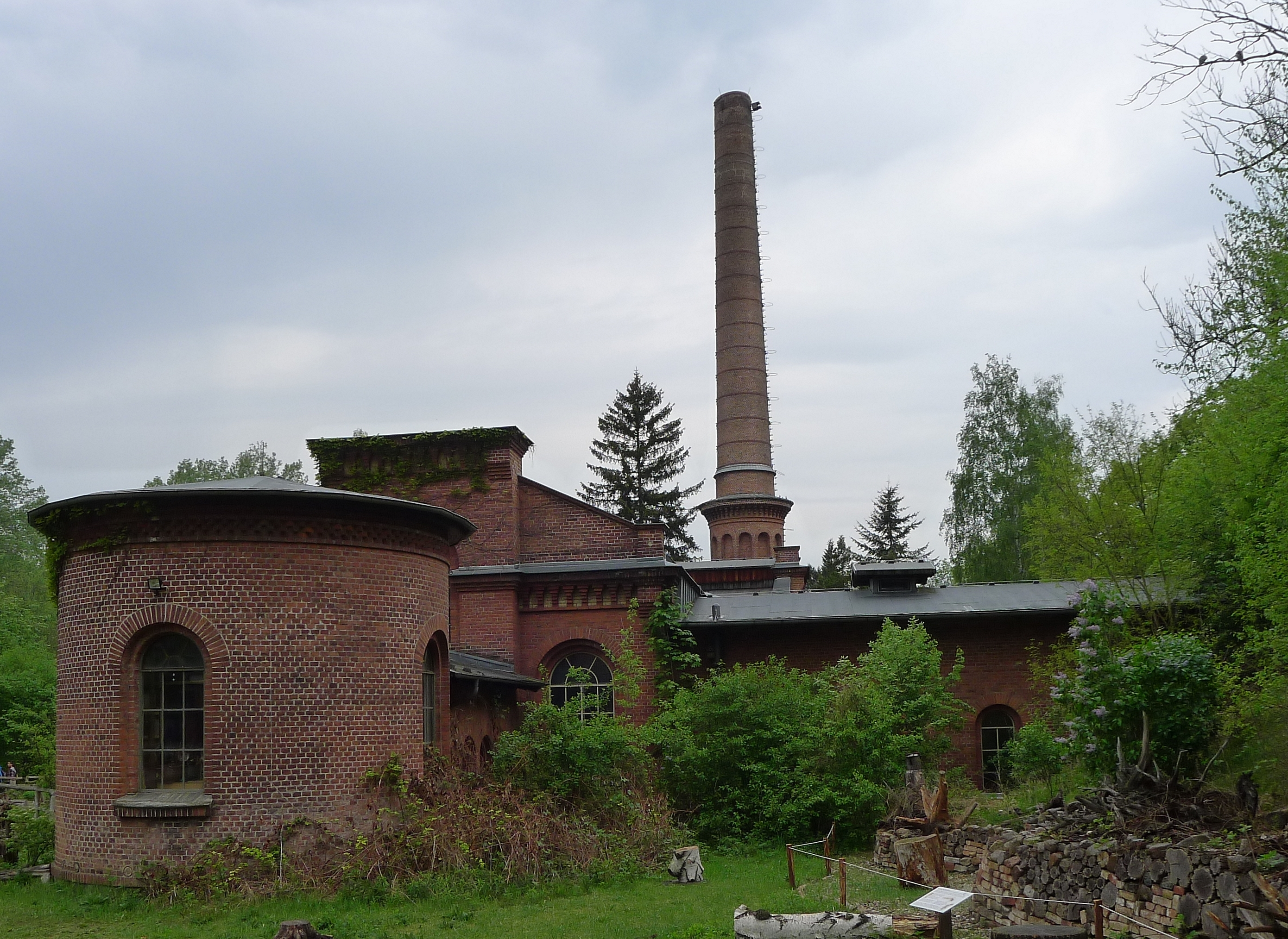 ehemaliges Wasserwerk